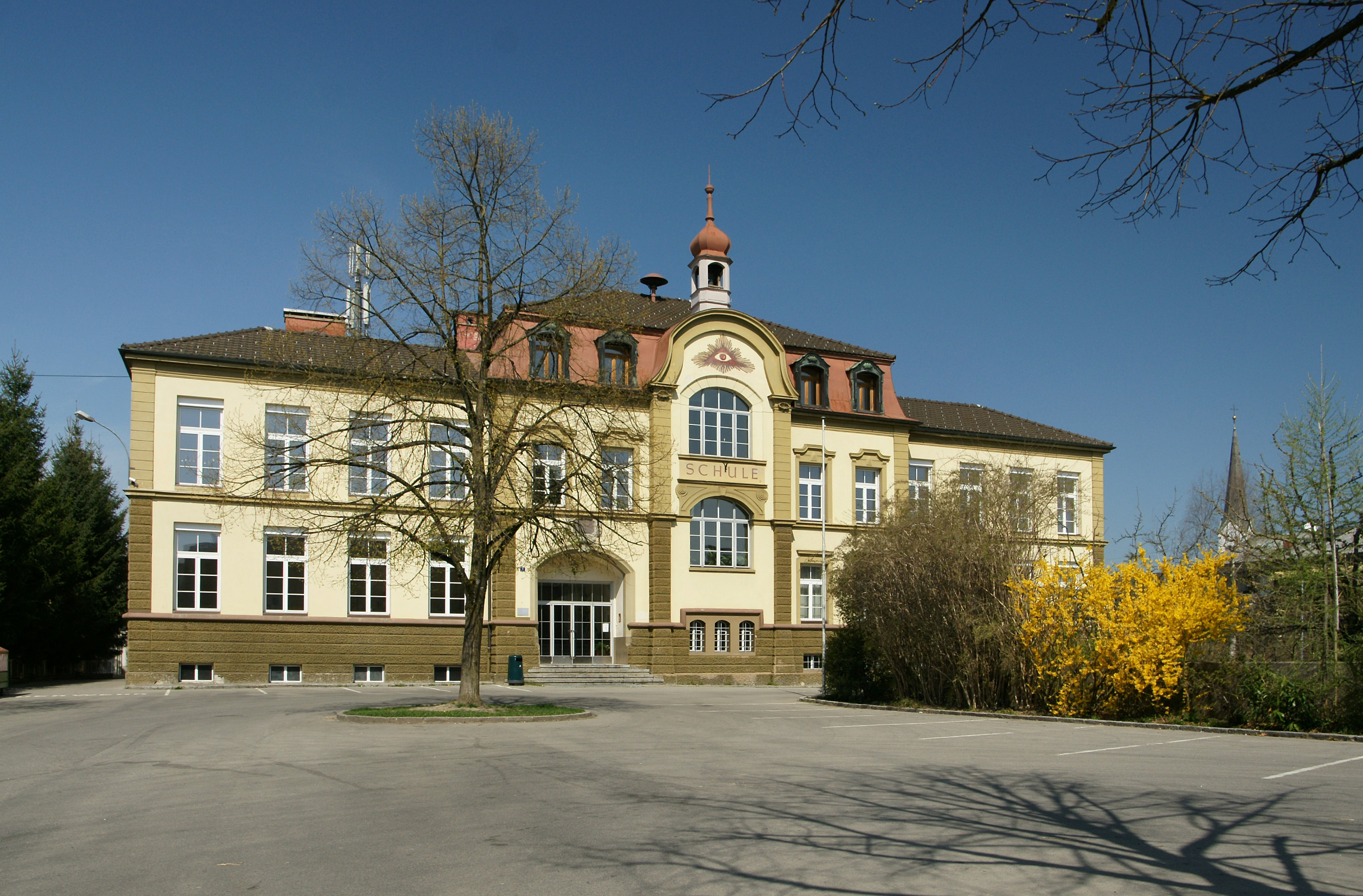 aus dem DEHIO Vorarlberg 1983: Hard, Schulweg Nr.3: Schule, erbaut 1901/2; breitgelagert, seichter Mittelrisalit mit geschweifter Vergiebelung, Dachreiter, historisierende Fassade.